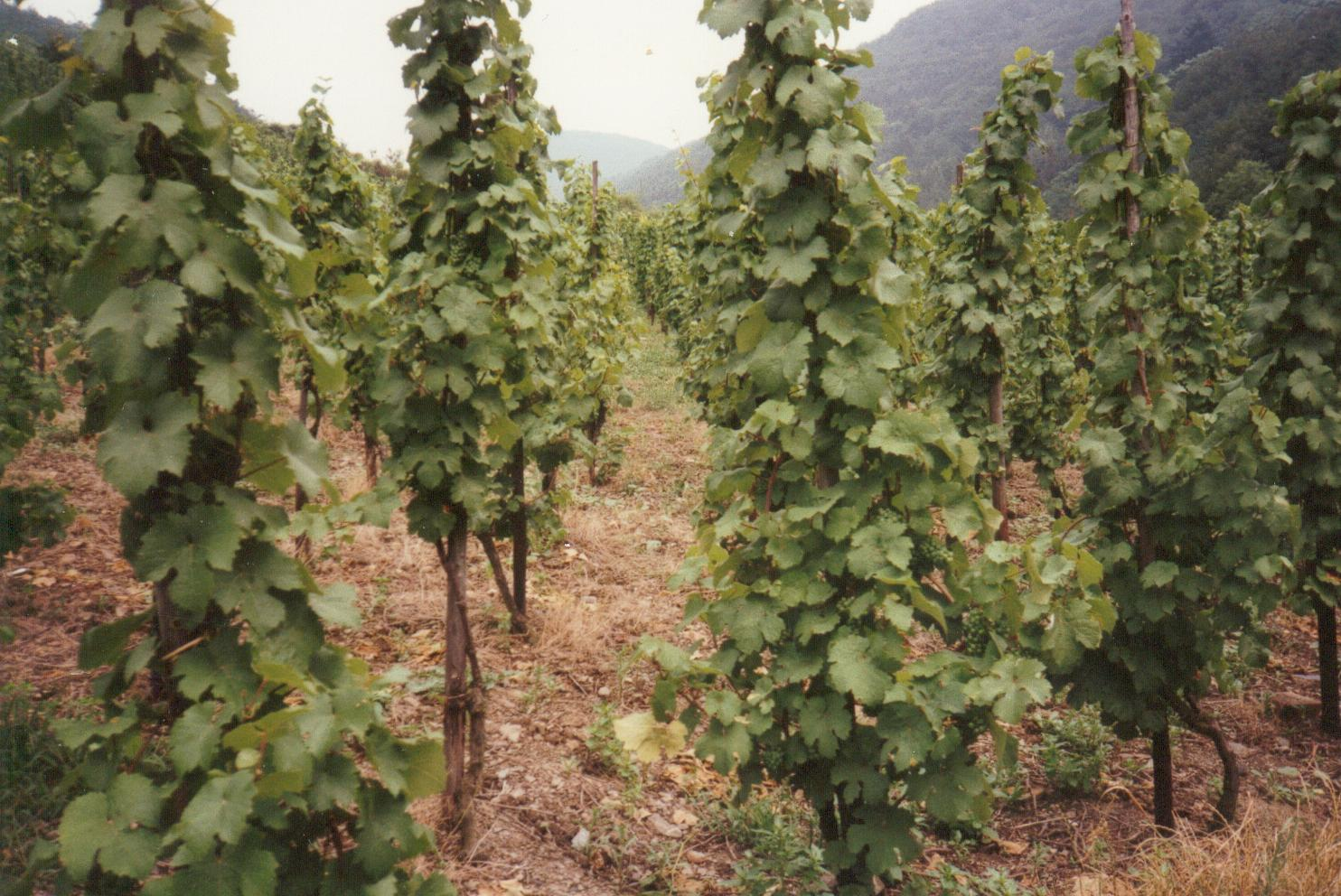 Weinstöcke